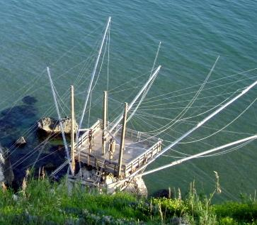 Il trabucco di Rodi Garganico